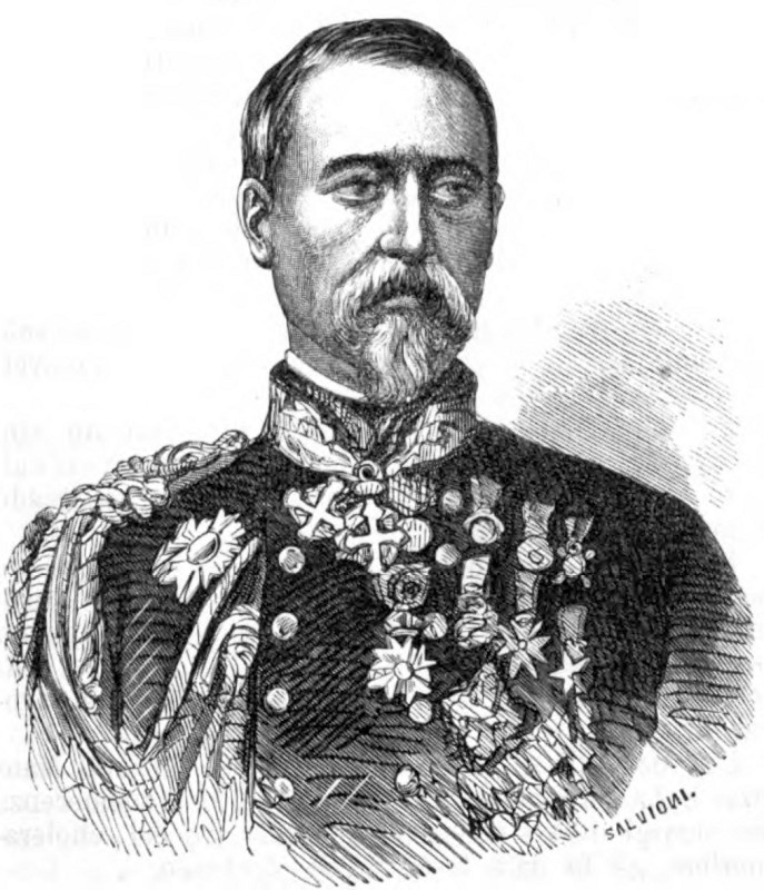 Ritratto di Domenico Cucchiari